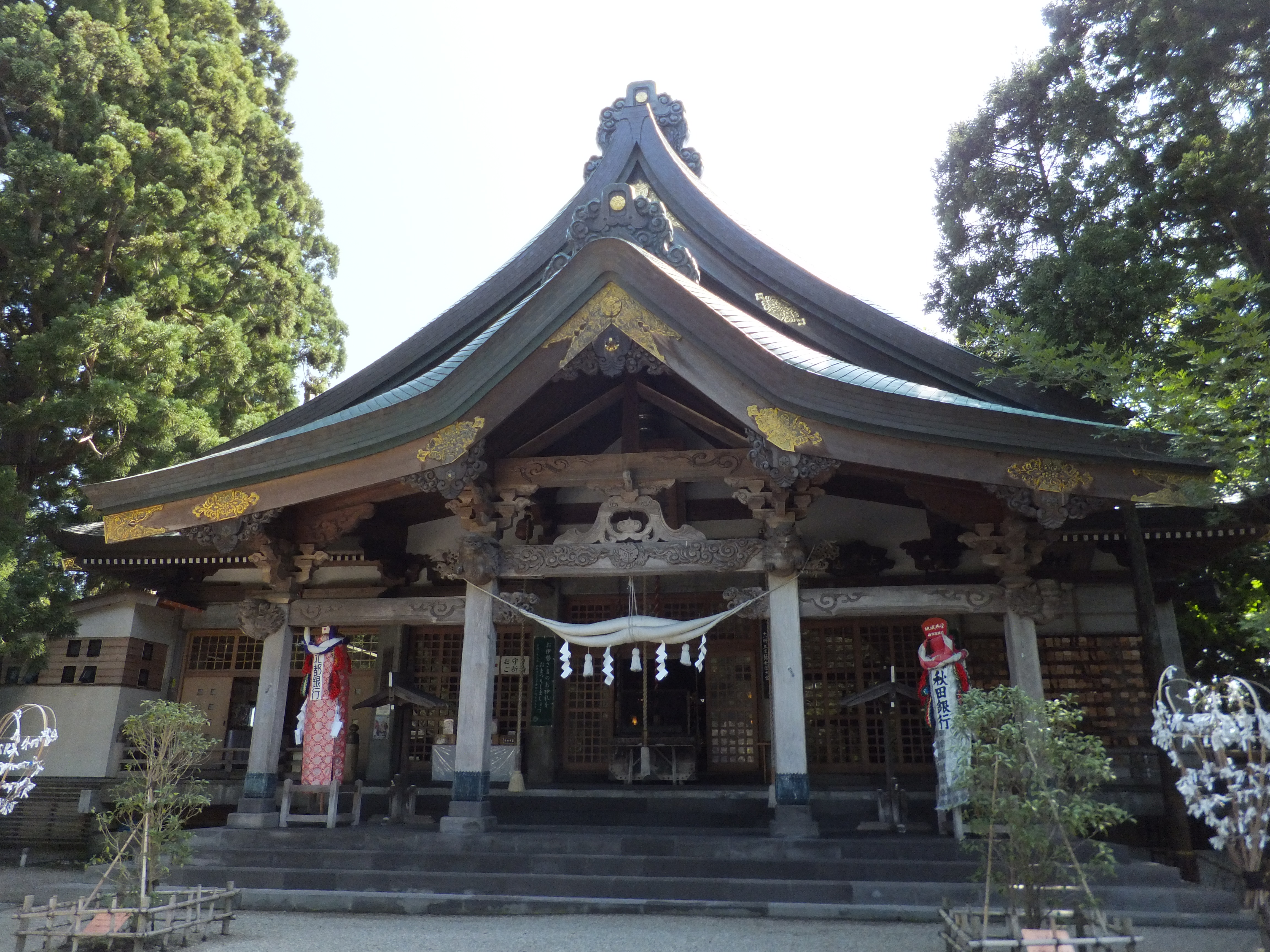 秋田市広面、太平山三吉神社